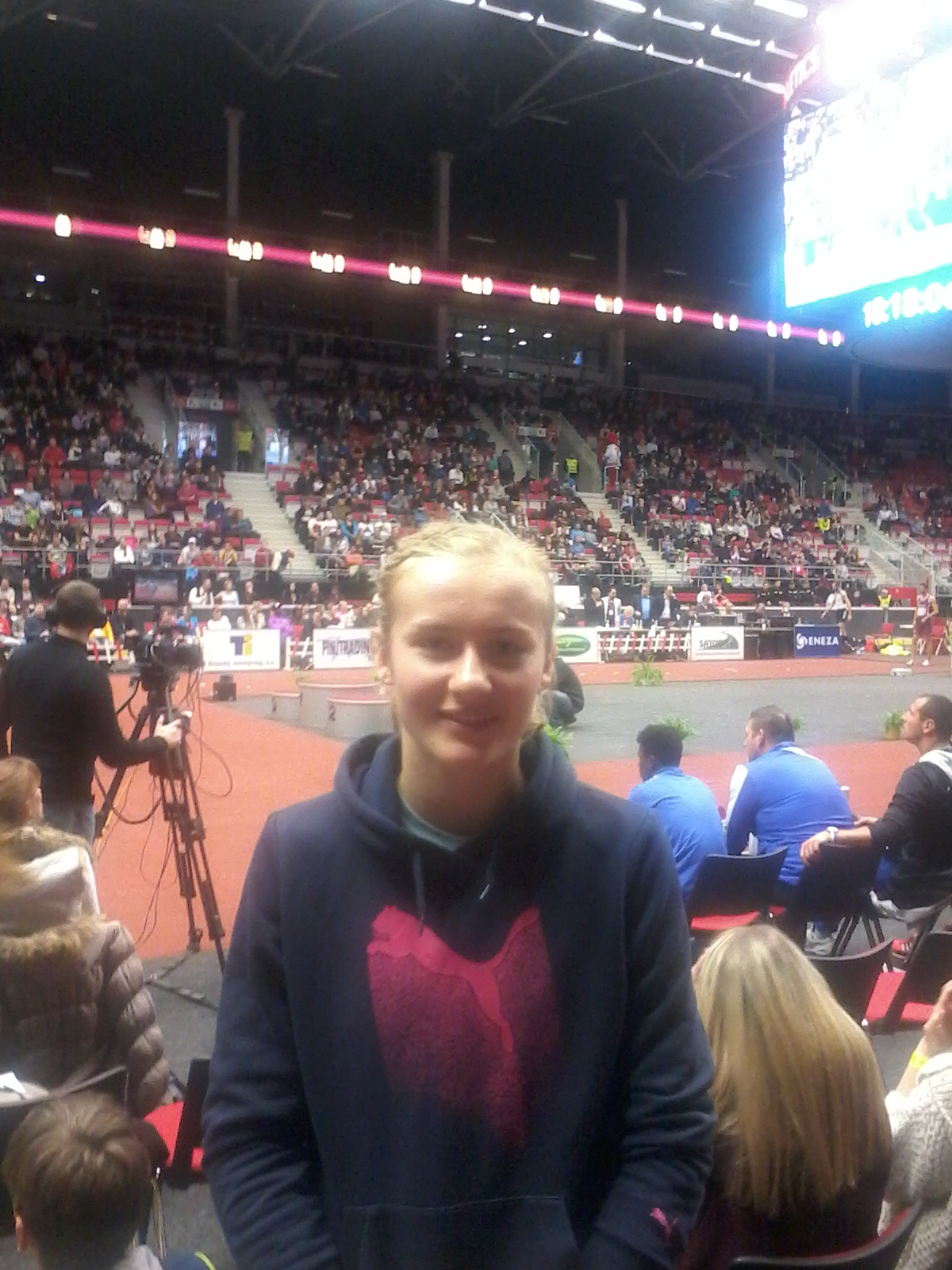 Michaela Hrubá - dne 7.2.2016 vyhrála v Třinci (Werk aréna) 24.ročník Beskydské laťky.